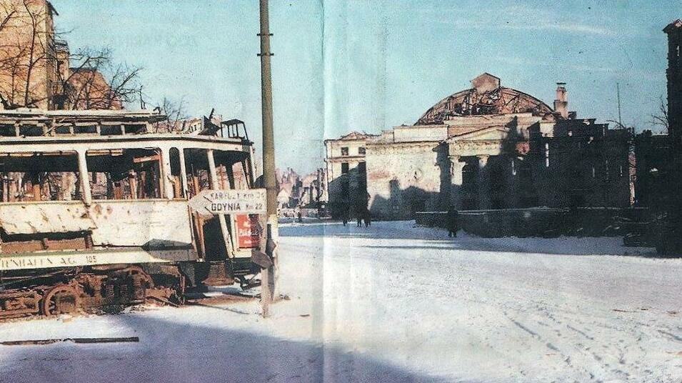 Zniszczony Targ Węglowy w styczniu 1946.